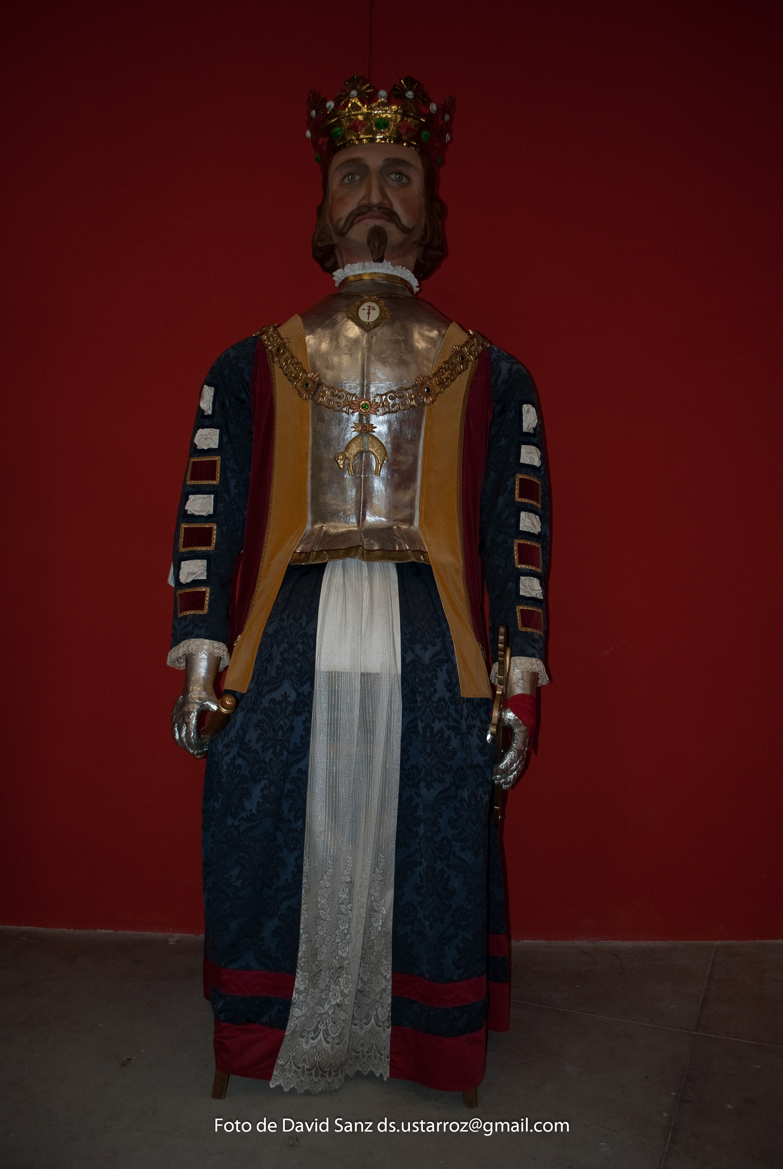 El REy Europeo, uno de los 8 gigantes de la Comparsa de Pamplona